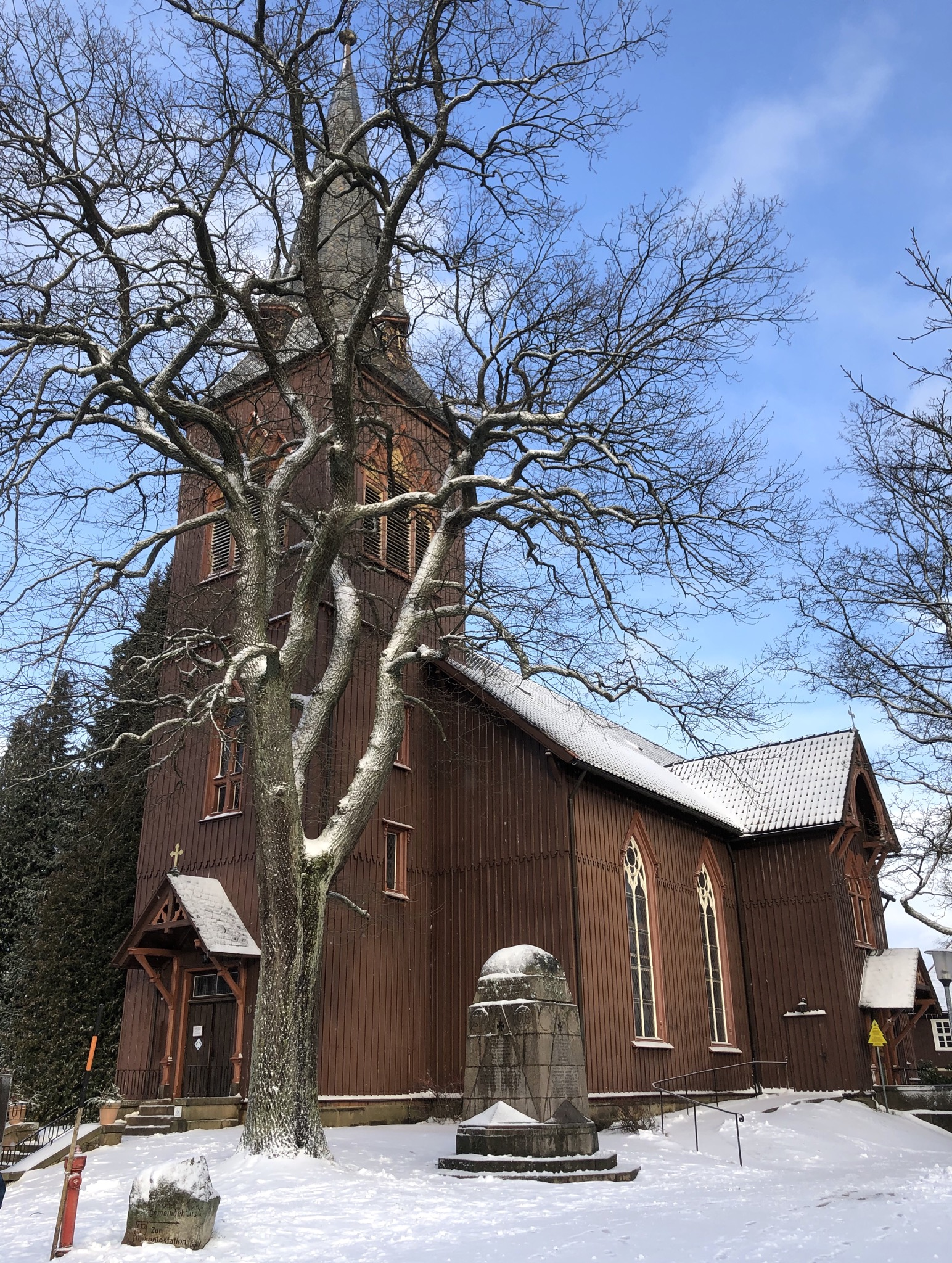 Trinitatiskirche in Braunlage